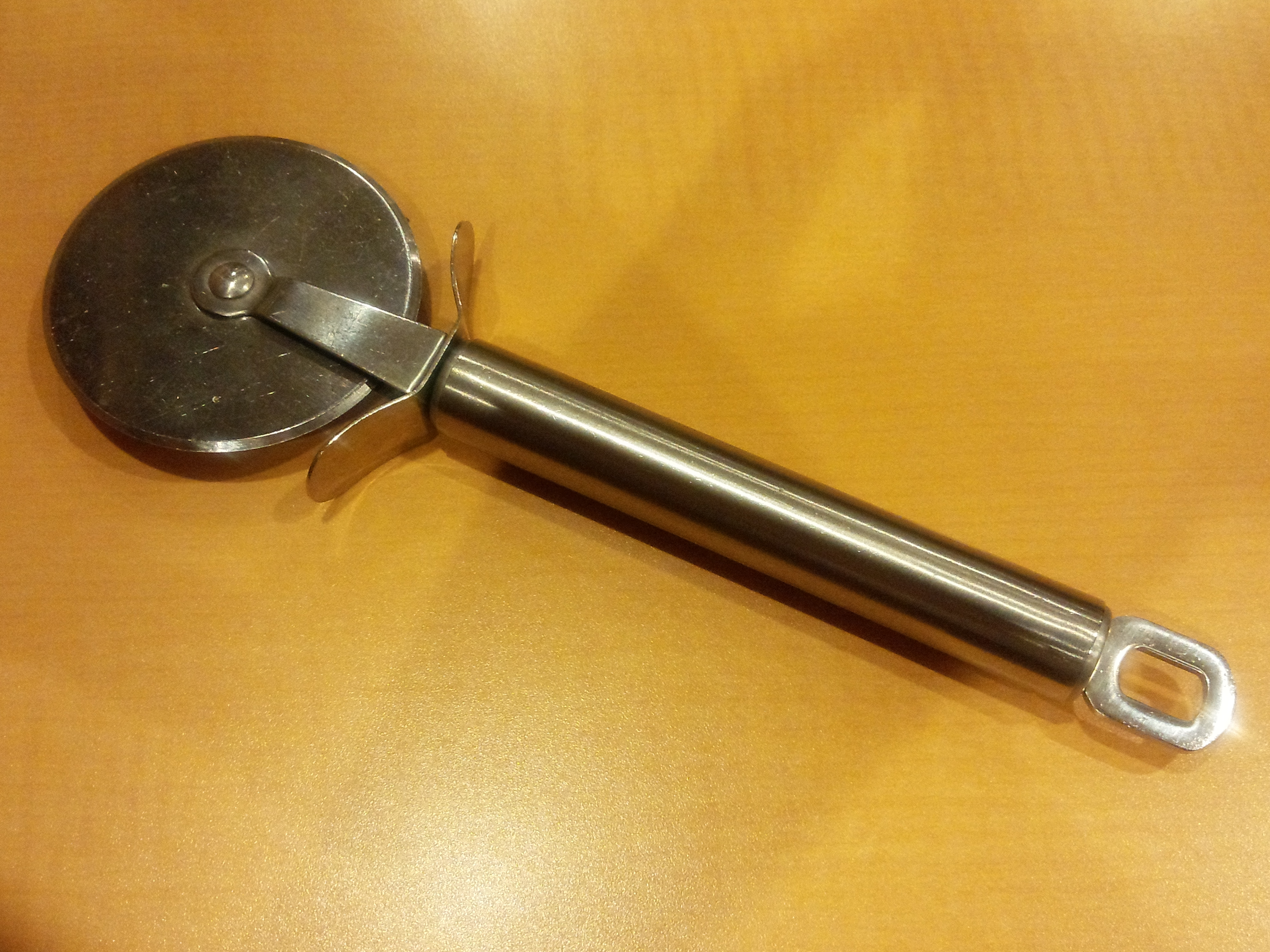 ピザホイール。